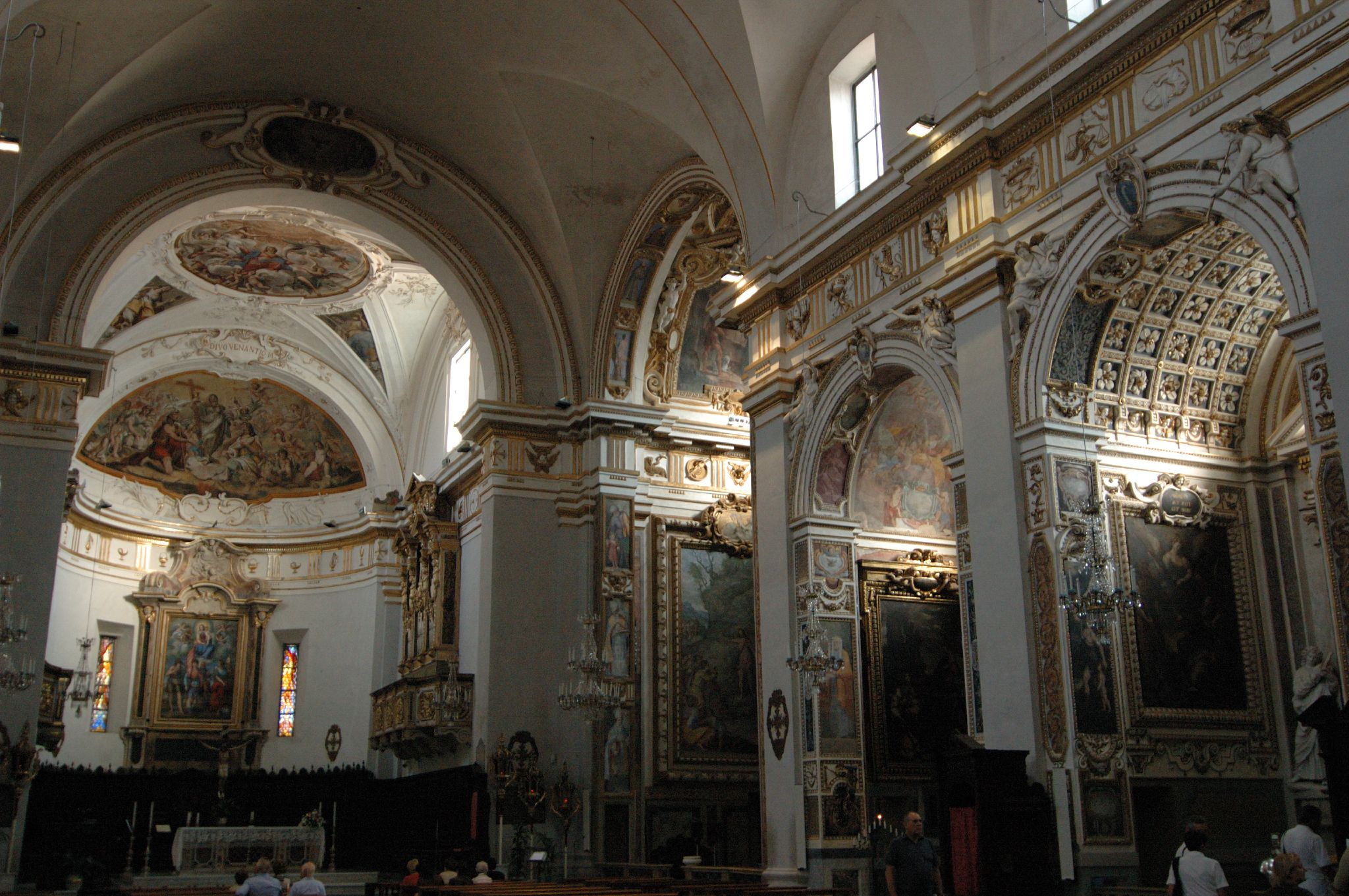 Interno della chiesa di San Venanzio a Fabriano.